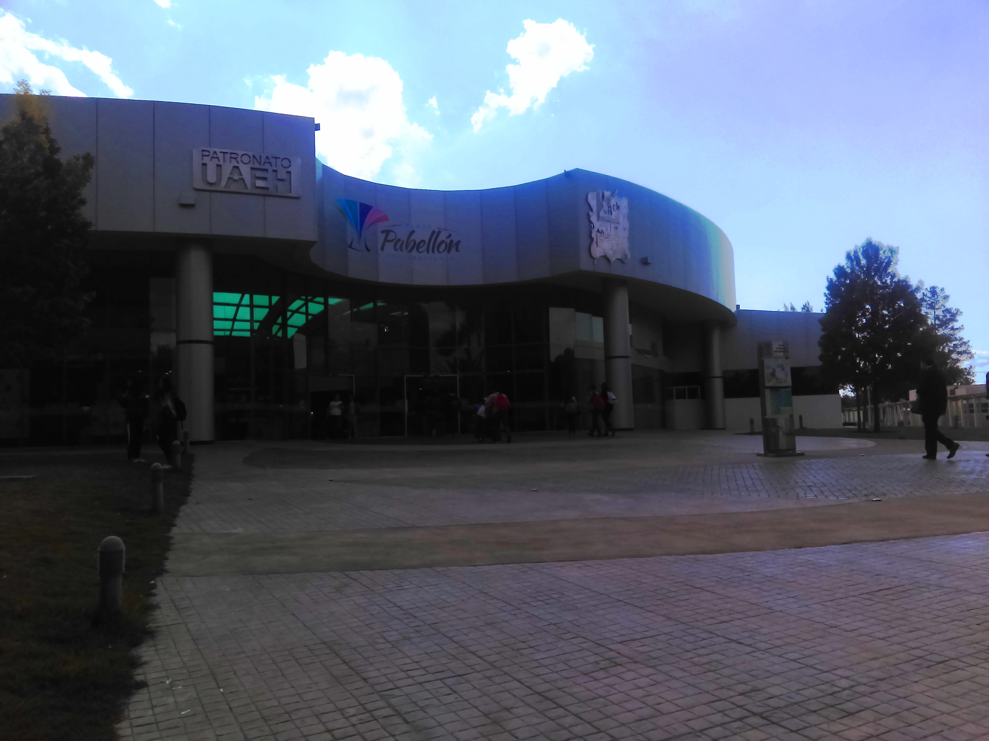 Ciudad del Conocimiento de la UAEH